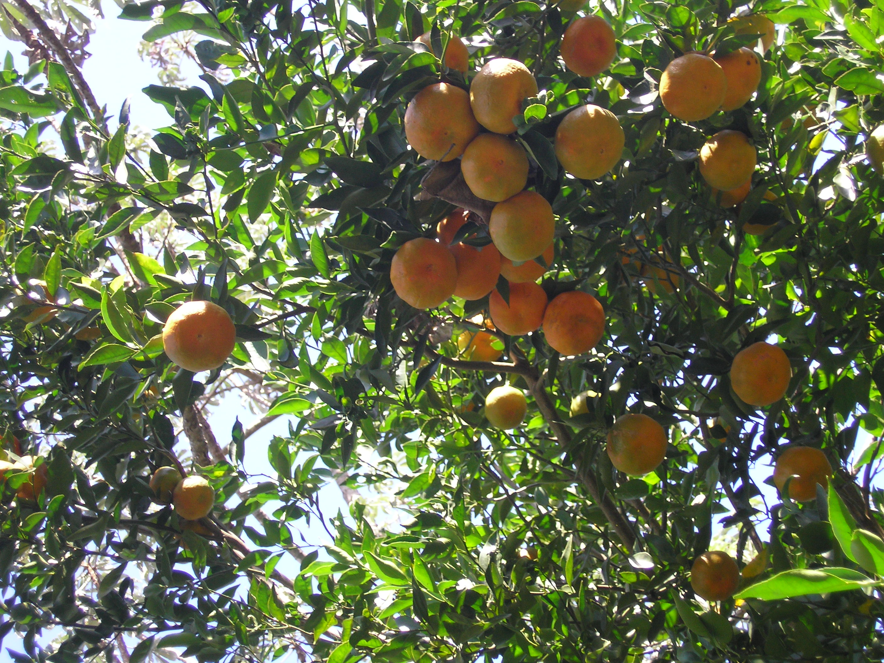 La producción de cítricos se ha vuelto muy expansiva en los últimos 4 años en el distrito de Veinticinco de Diciembre. Incluyendo las especias de mandarinas, naranjas, pomelos piñas y limones.